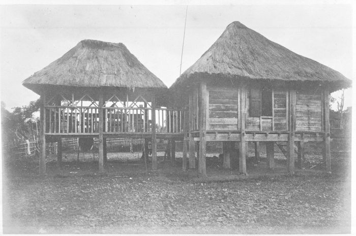 Foto. Deze foto is gemaakt tijdens de Sumatra Expeditie van 1877-1879. Landschappen uit de Padangsche Bovenlanden.. Negri-huis te Si Lago, Padangse Bovenlanden, Sumatra`s Westkust